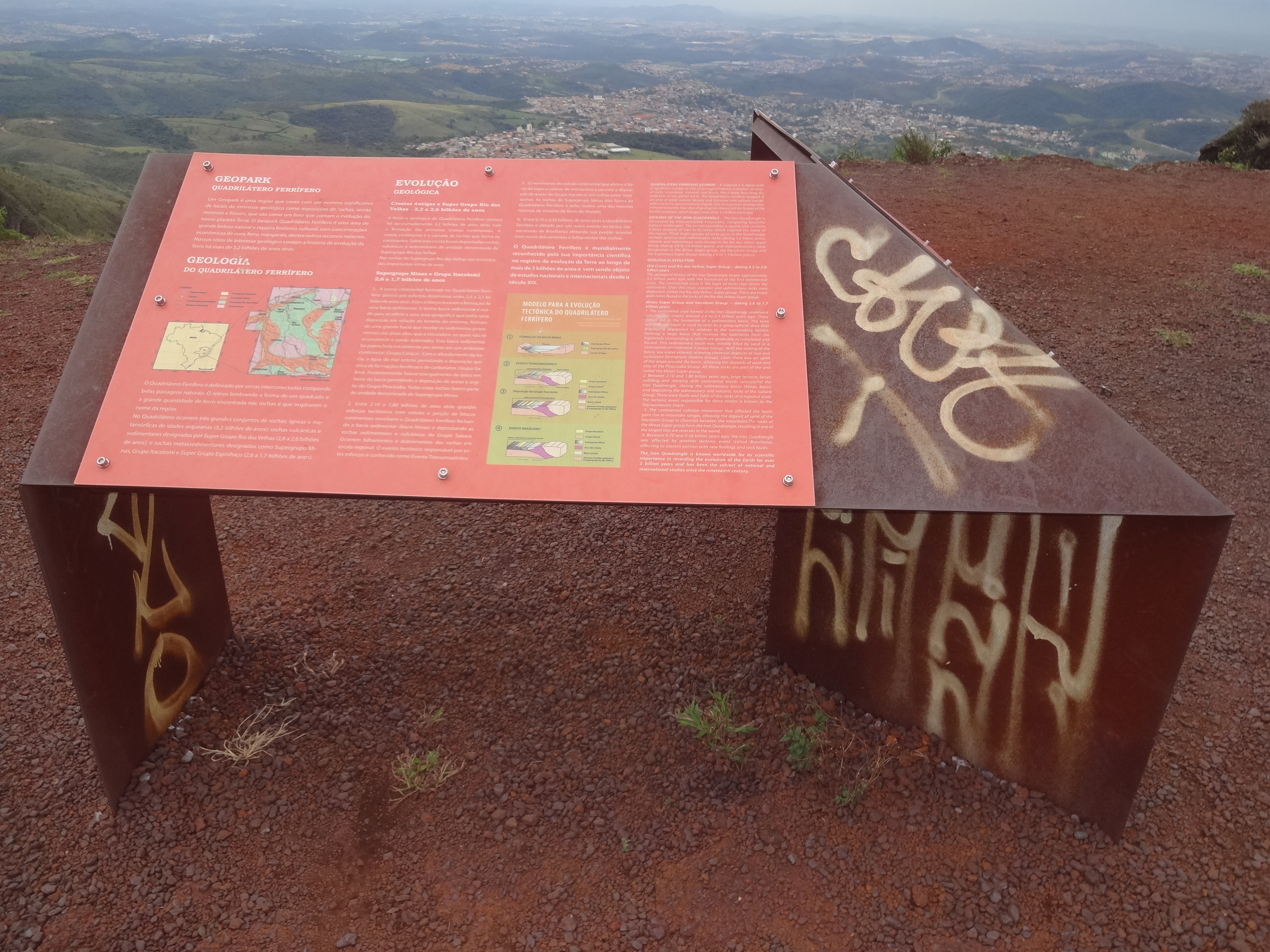 Placa na Serra do Rola-Moça, próximo a Belo Horizonte.